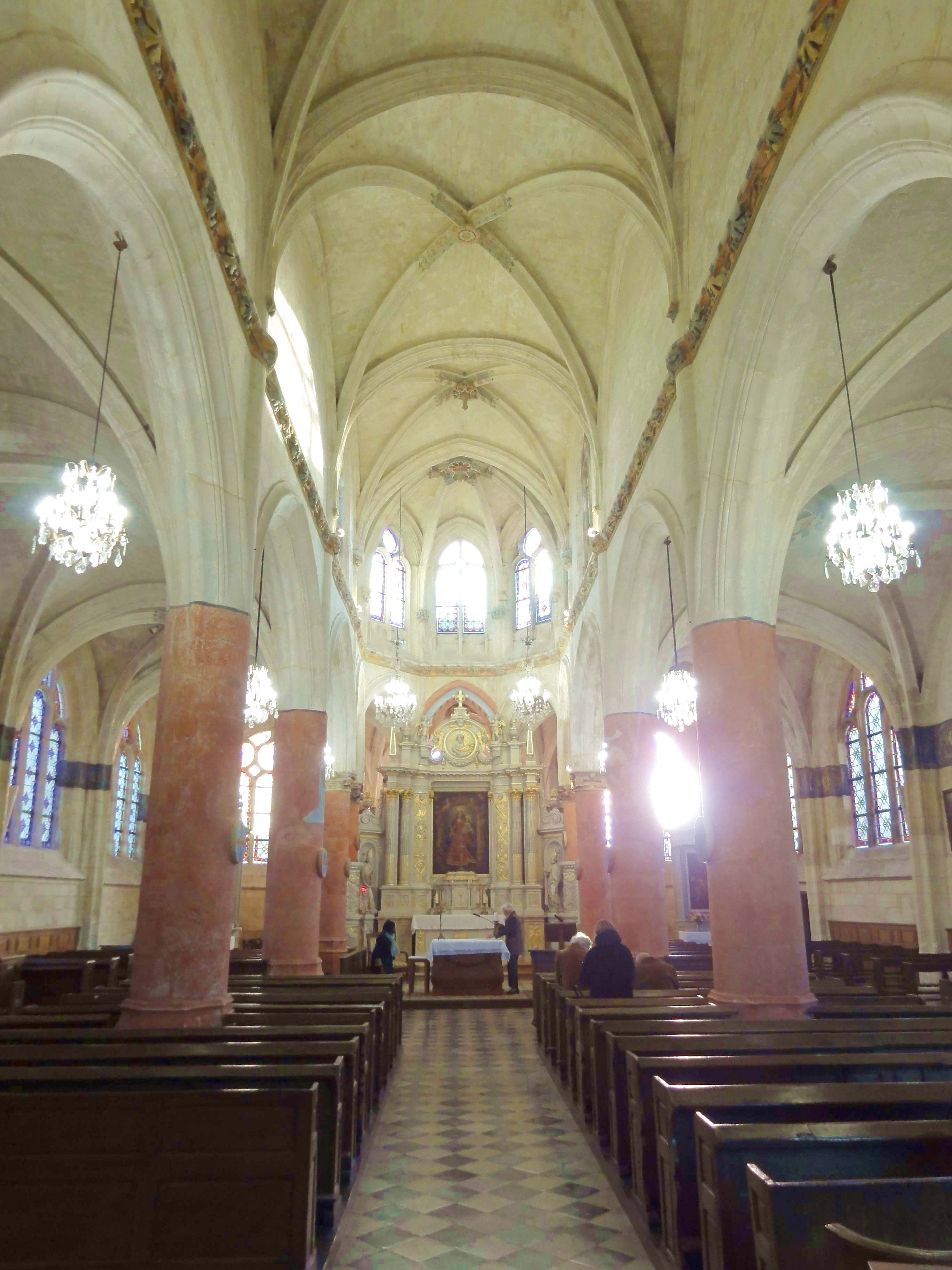 Intérieur de l'église - voir titre.